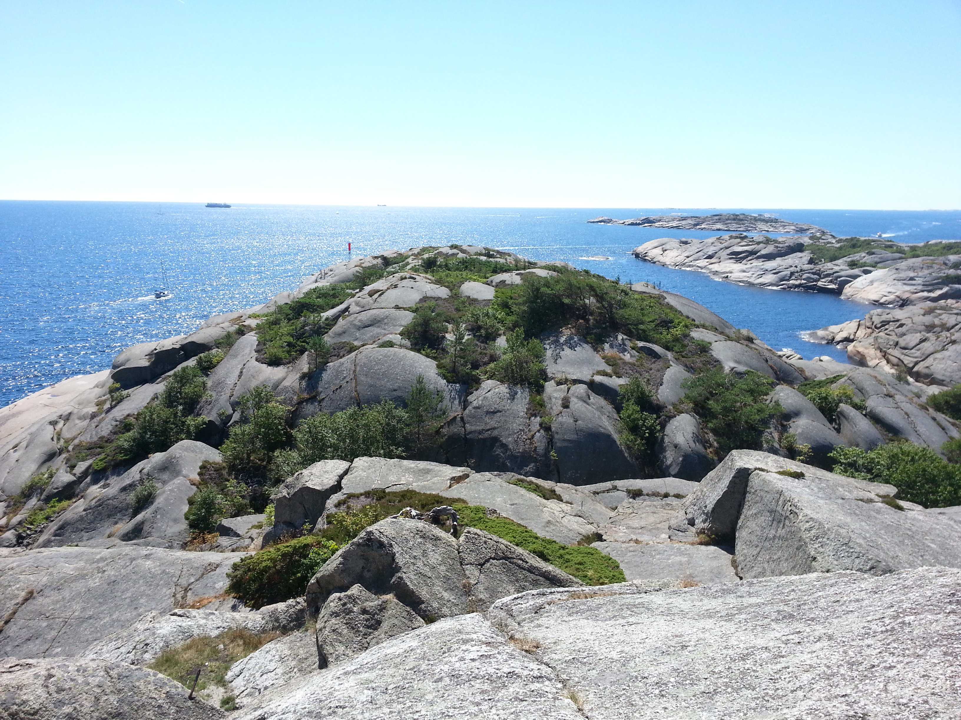 Utsikt over Tønsbergfjorden fra Tønsberg tønne, Sandefjord, Norway